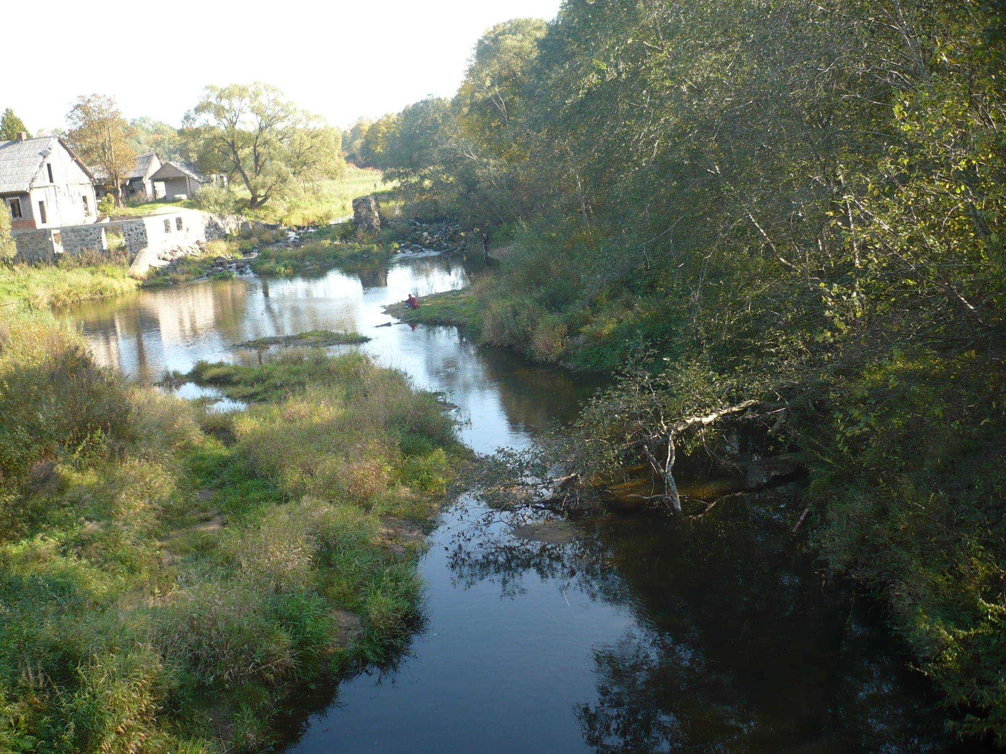 Šalpė ir Pagraumenės malūnas